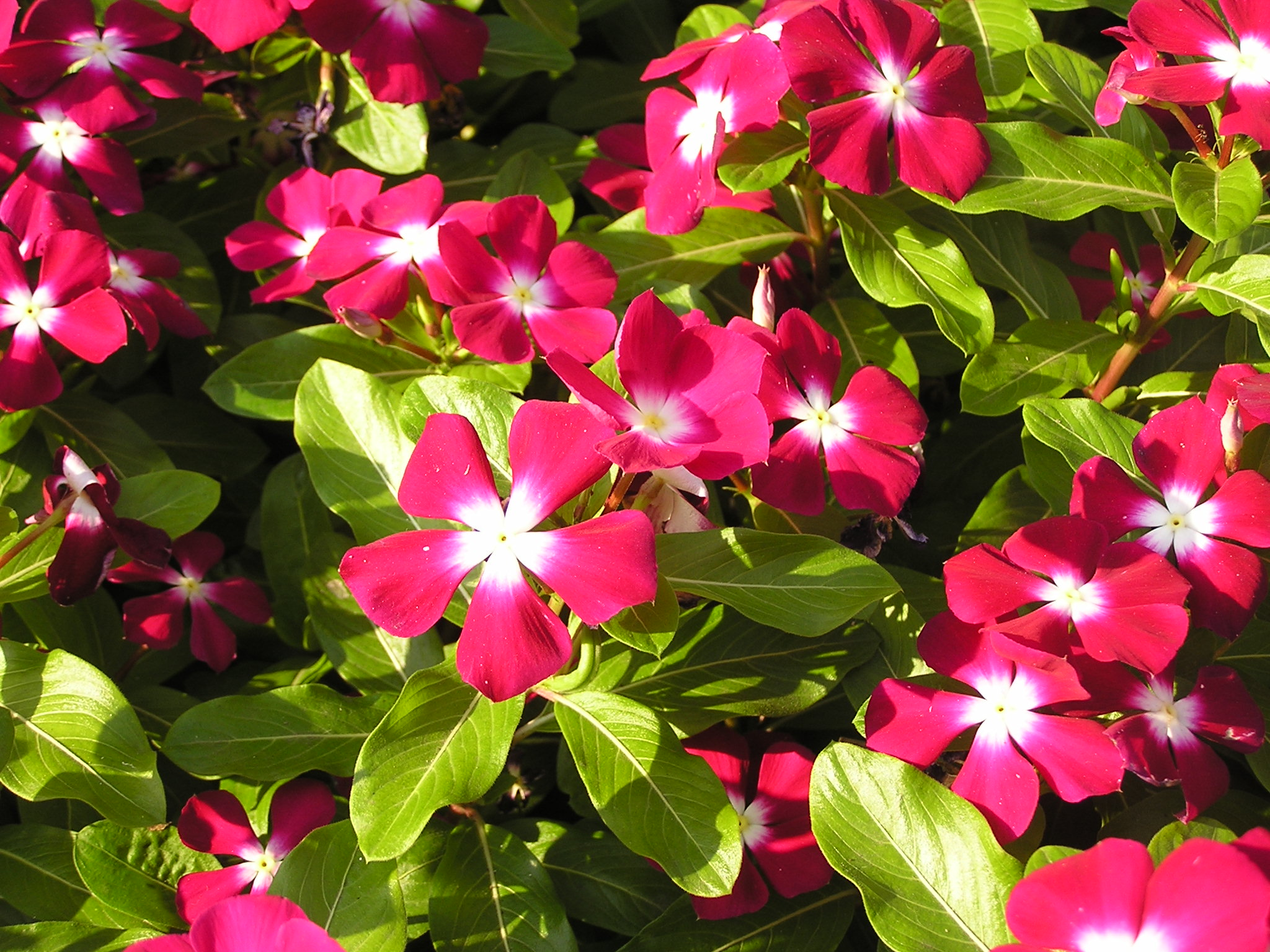 Растение